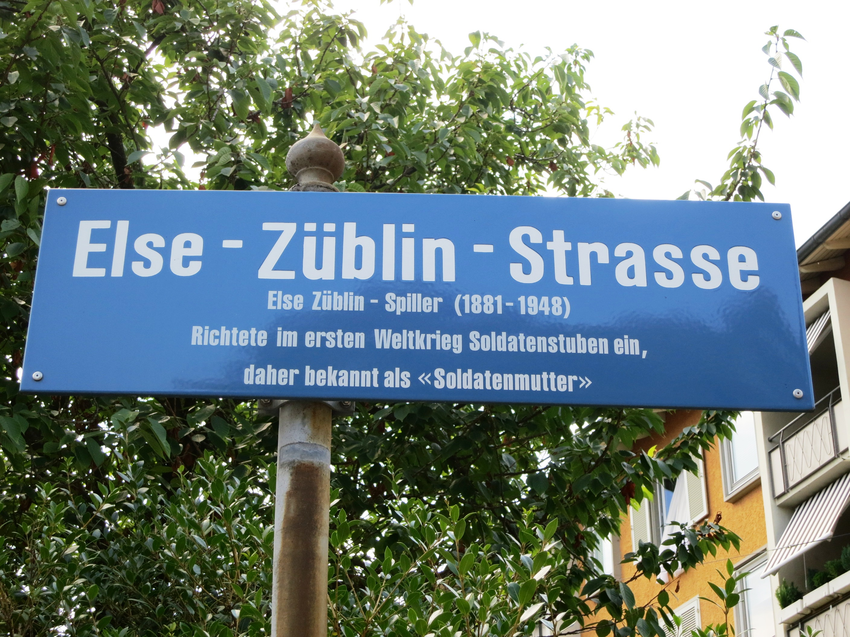 Else-Züblin-Strasse, Zürich-Albisrieden, Schweiz